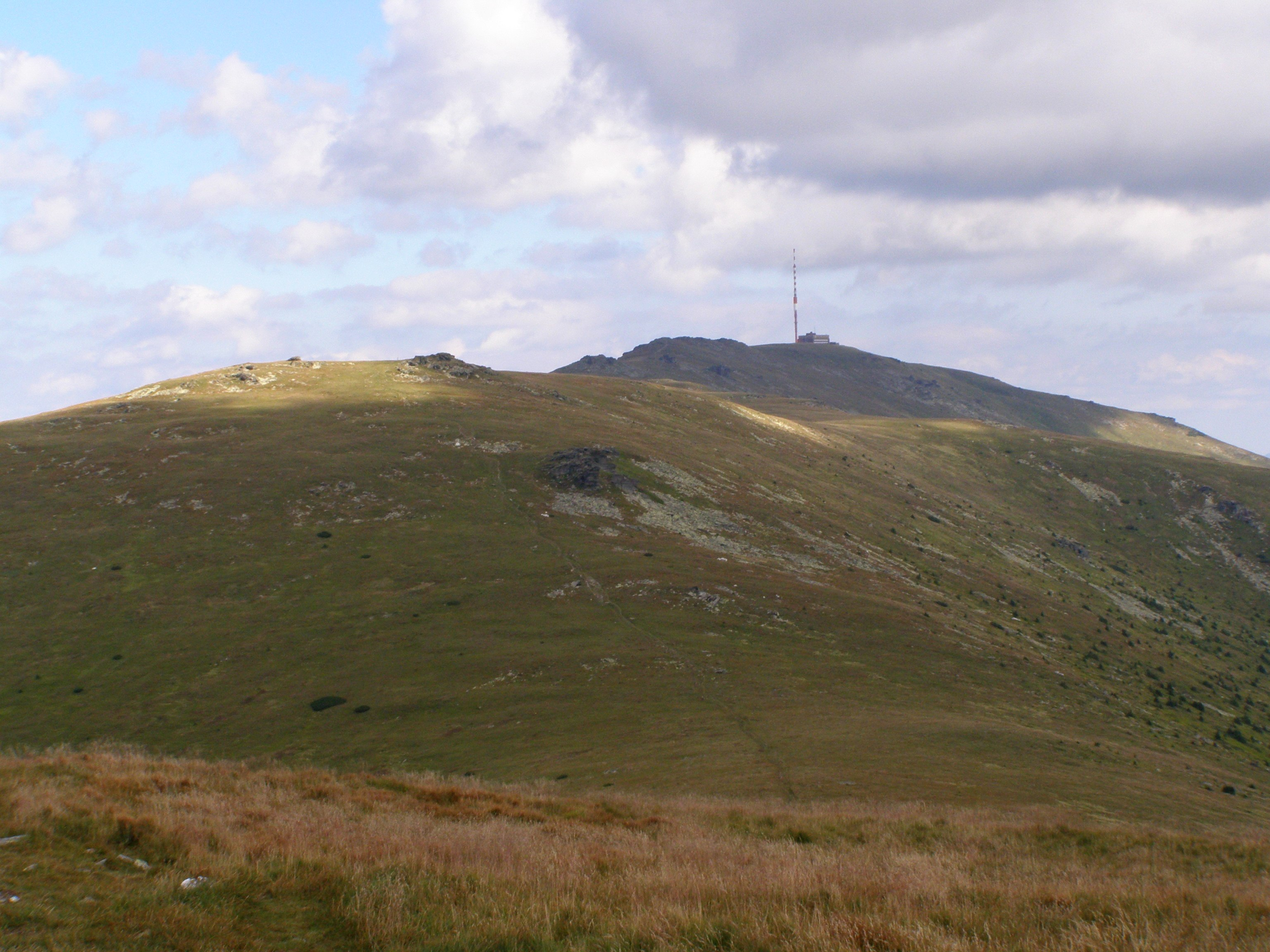 Nízké Tatry, Kráľovohoľské Tatry, vlevo vrchol Stredná hoľa (1876 m), vpravo Kráľova hoľa (1946 m)